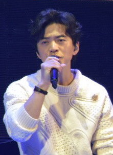 中文（中国大陆）: 2020年1月11日，“不止是李健”世界巡回演唱会·上海站